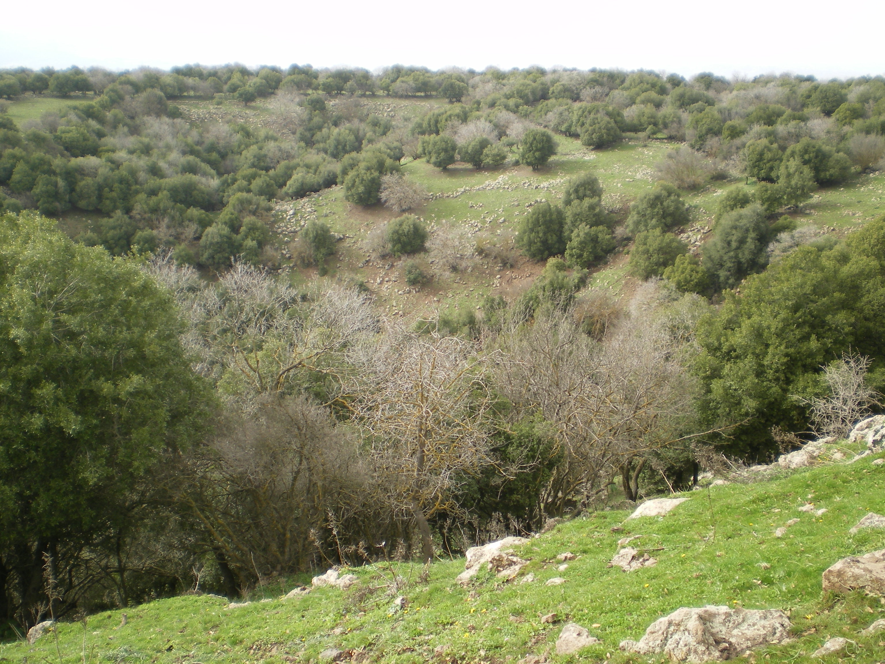 הגובה הגדולה ביער אודם